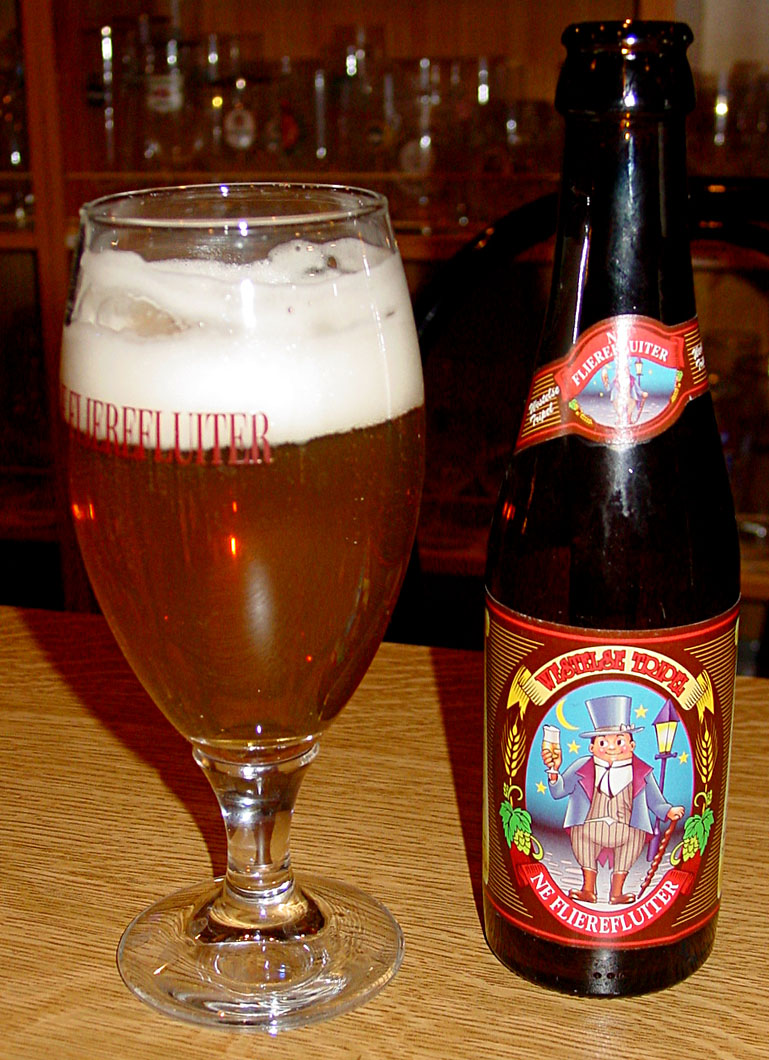 Ne Flierefluiter